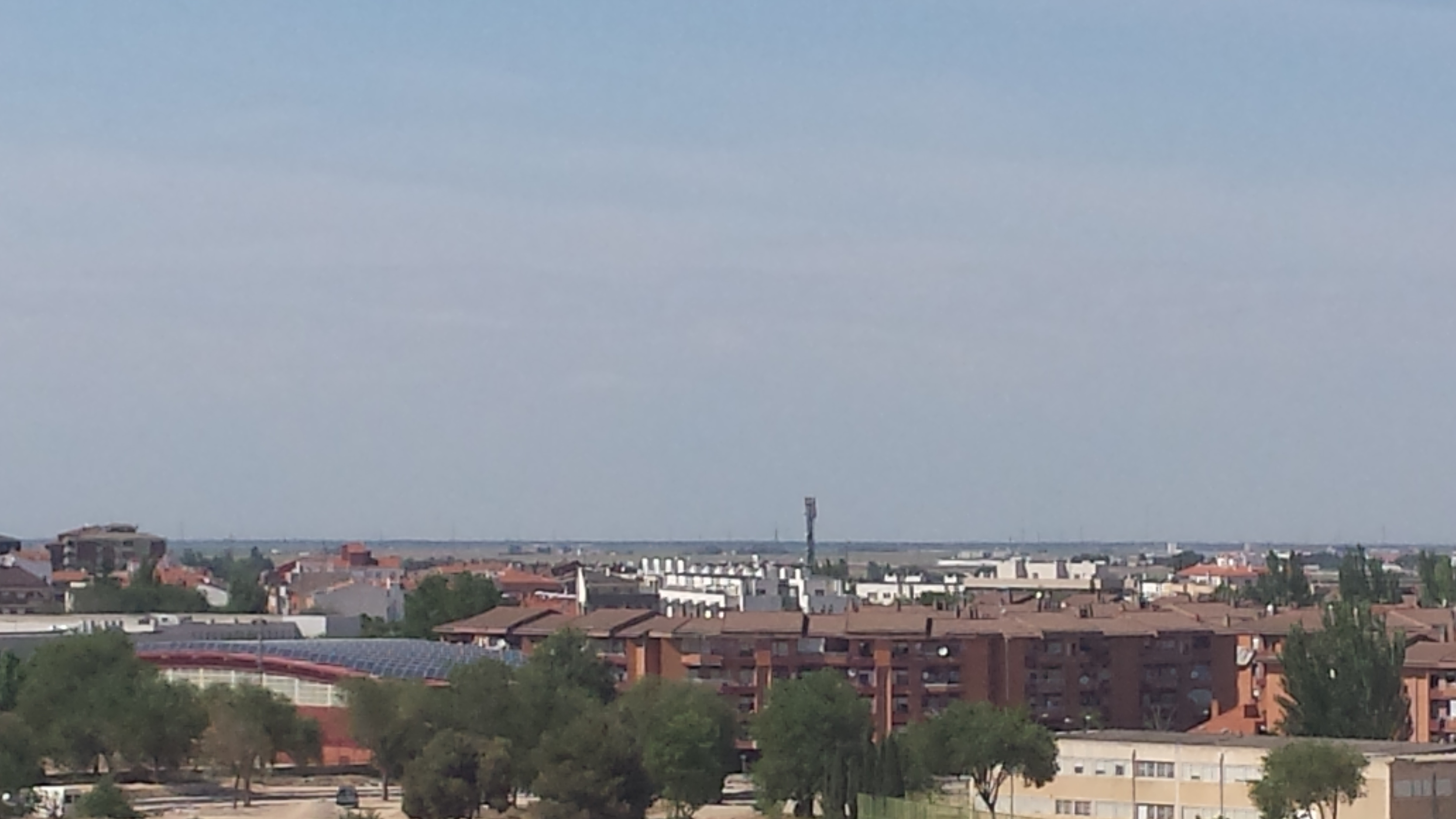 Barrio La Milagrosa. Las Seiscientas (Las 600). Albacete